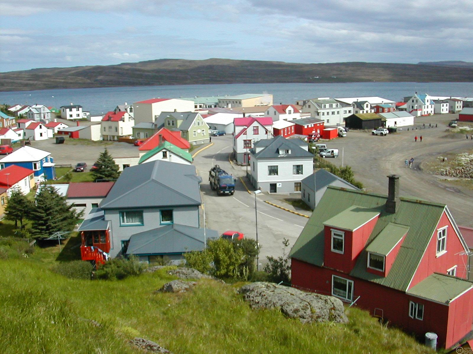 La ville de Hólmavik, en Islande. La photographie a été prise en juillet 2004 par Johann Dréo (nojhan), on voit le centre ville depuis le temple qui surplombe la ville. Taille de l'image : 1600 x 1200, photographie à l'appareil numrique.